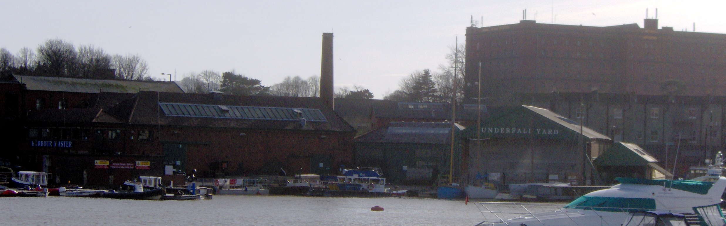 Underfall Yard in Bristol.